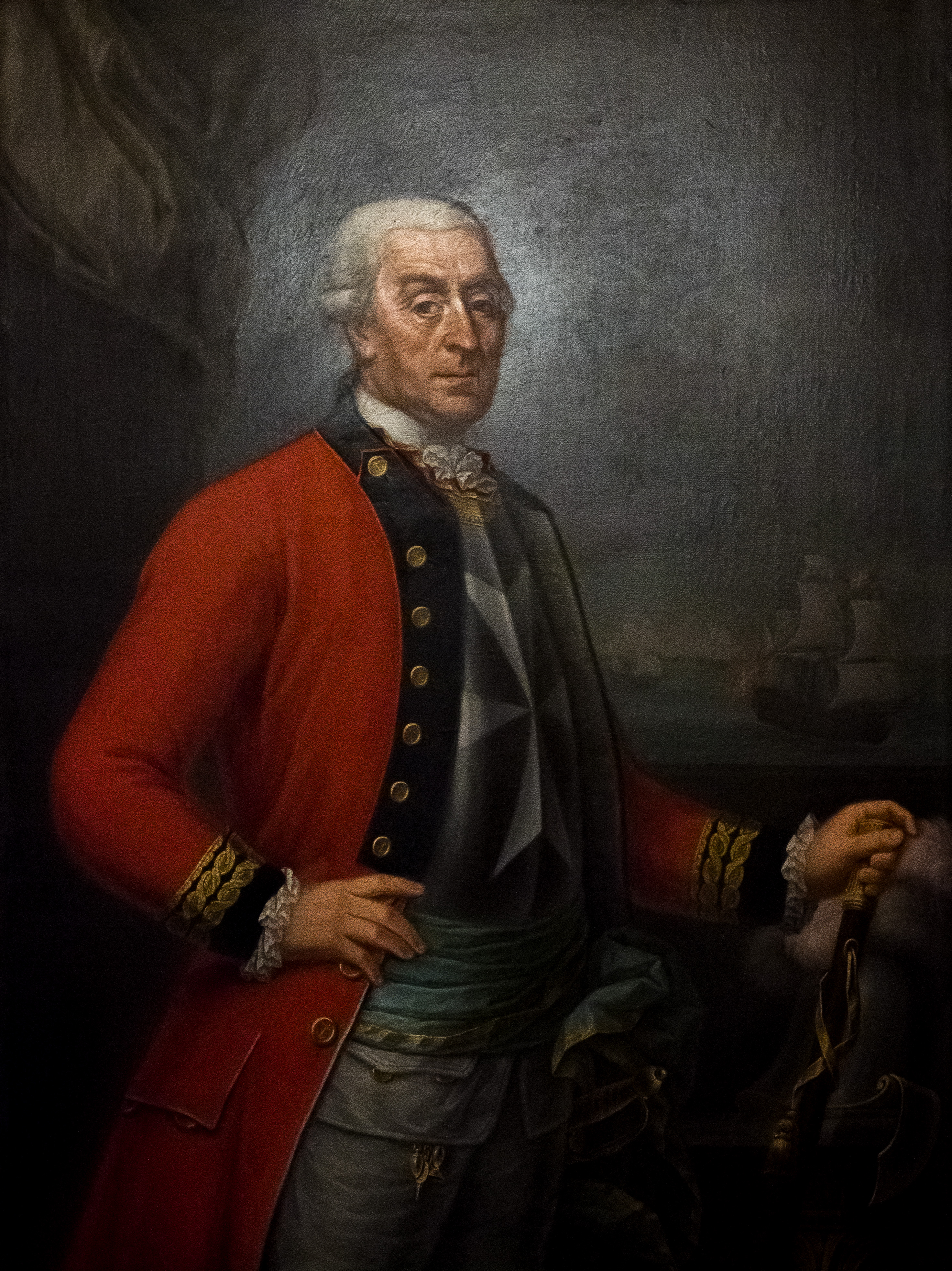 Giovanni Battista Tommasi, 73. Großmeister des SMOM